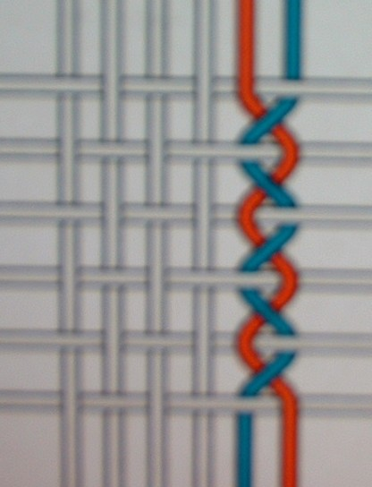 Schema der Dreherbindung